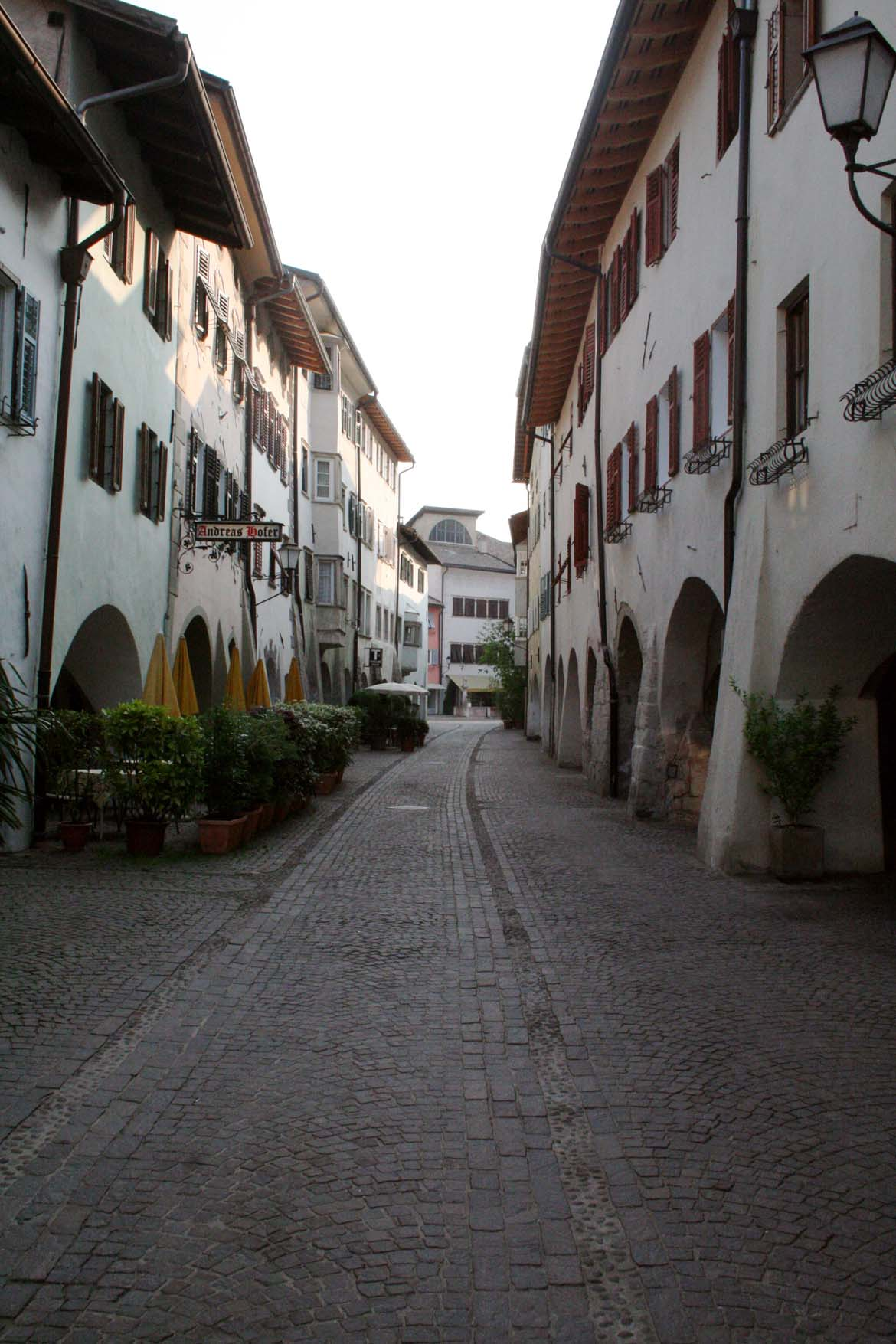 Altstadt von Neumarkt